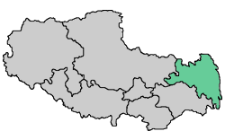 昌都位置图，作者：Bigbigbighero，日期：2003年8月24日。